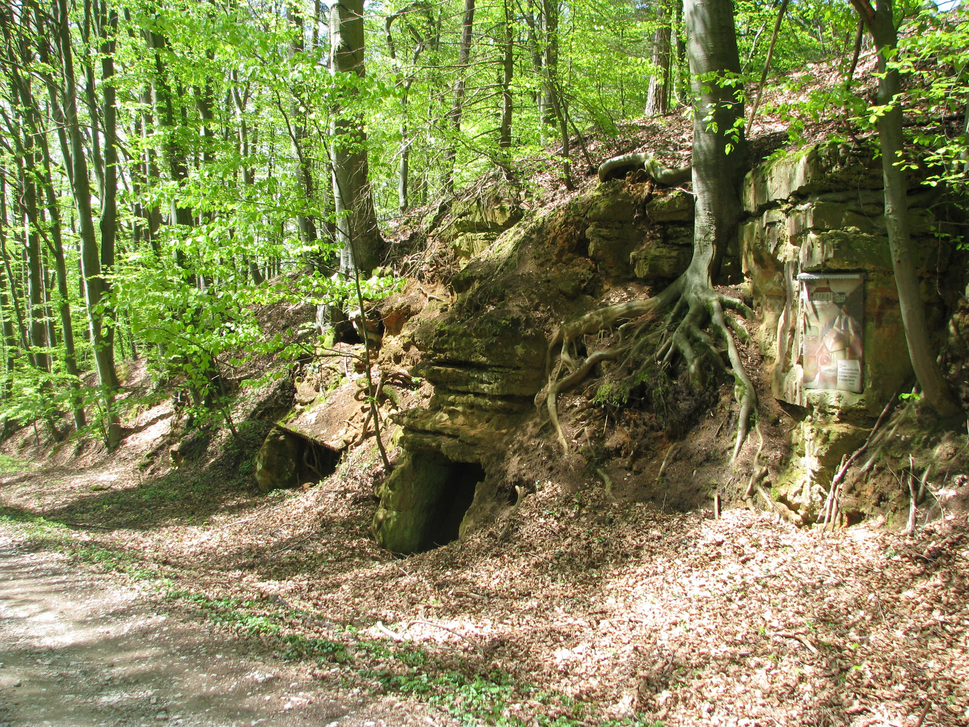 Oberwall, Ortsteil der Gemeinde Berg bei Neumarkt in der Oberpfalz, Felsenkeller